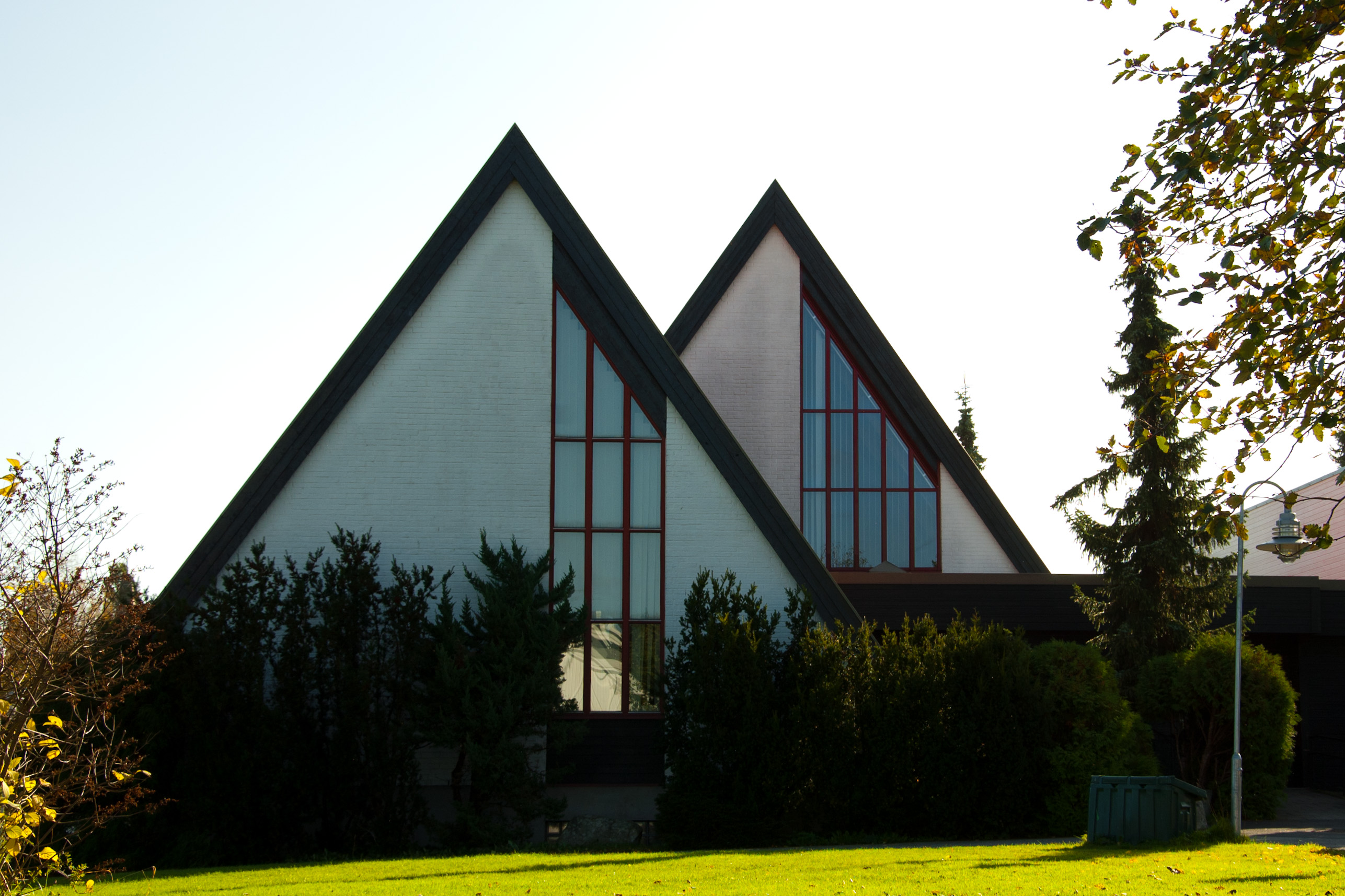 Solvangkirken på Solvang i Tønsberg